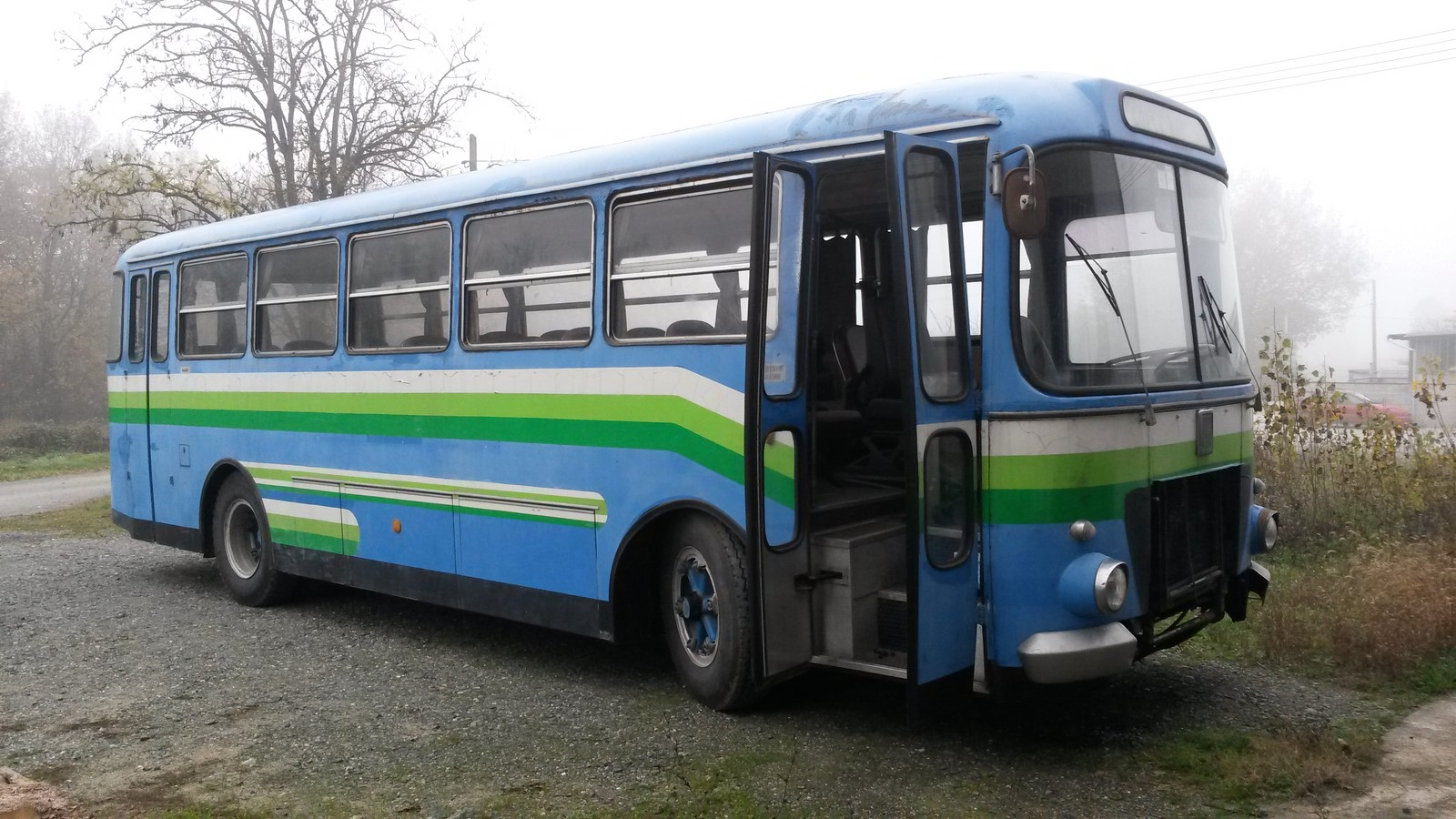 Fiat 309/1 Cansa del 1967 n.ro 16 interurbano preservato da Storicbus-Museo dell'Autobus Italiano